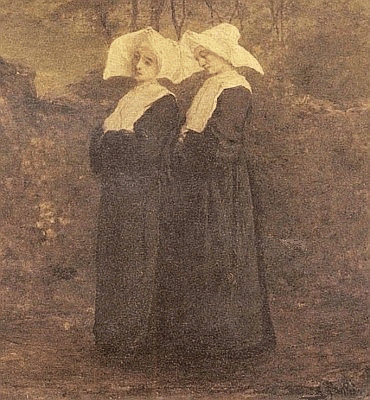 "Nuns", 32.7 x 23.5 cm - Oil on panel